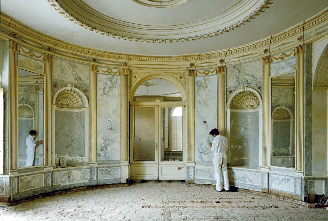 Kasteel Vaeshartelt: INTERIEUR, EETZAAL (TIJDENS RESTAURATIE)